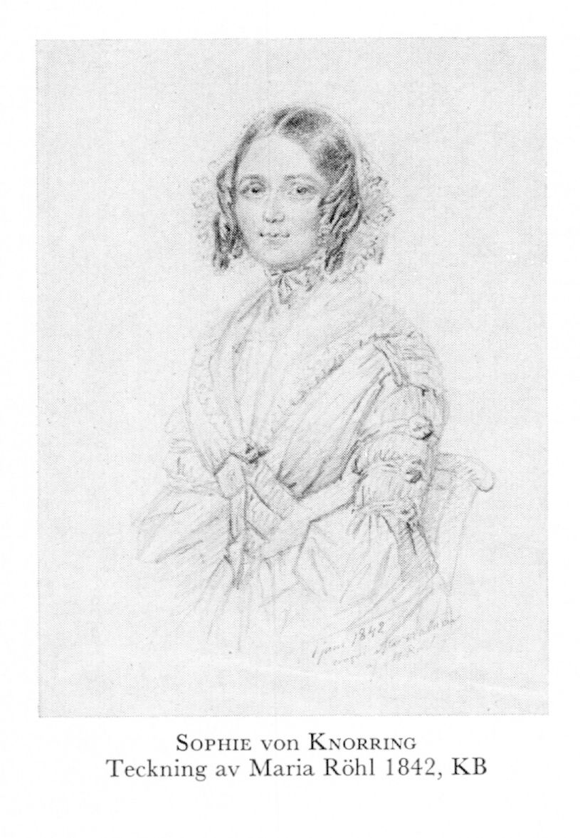 Författaren och friherrinnan Sophie von Knorring avbildad av Maria Röhl.